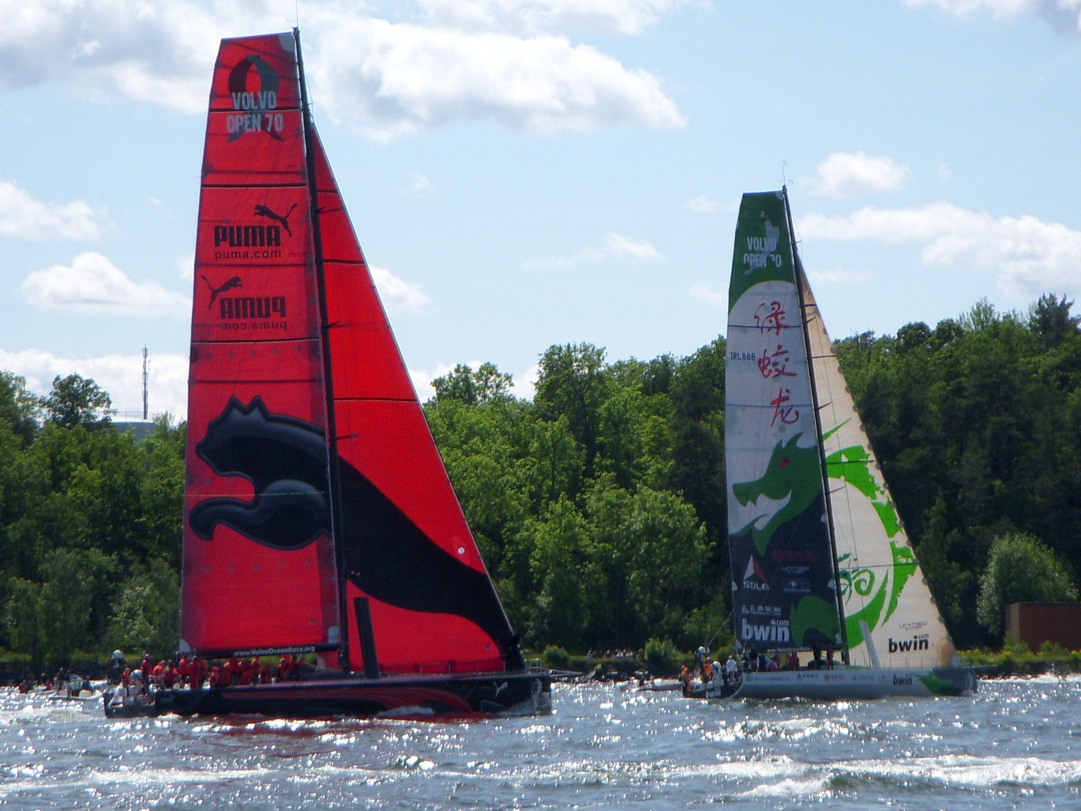 Volvo Ocean Race 2008/2009, Stopover Stockholm, PUMA + BWIN